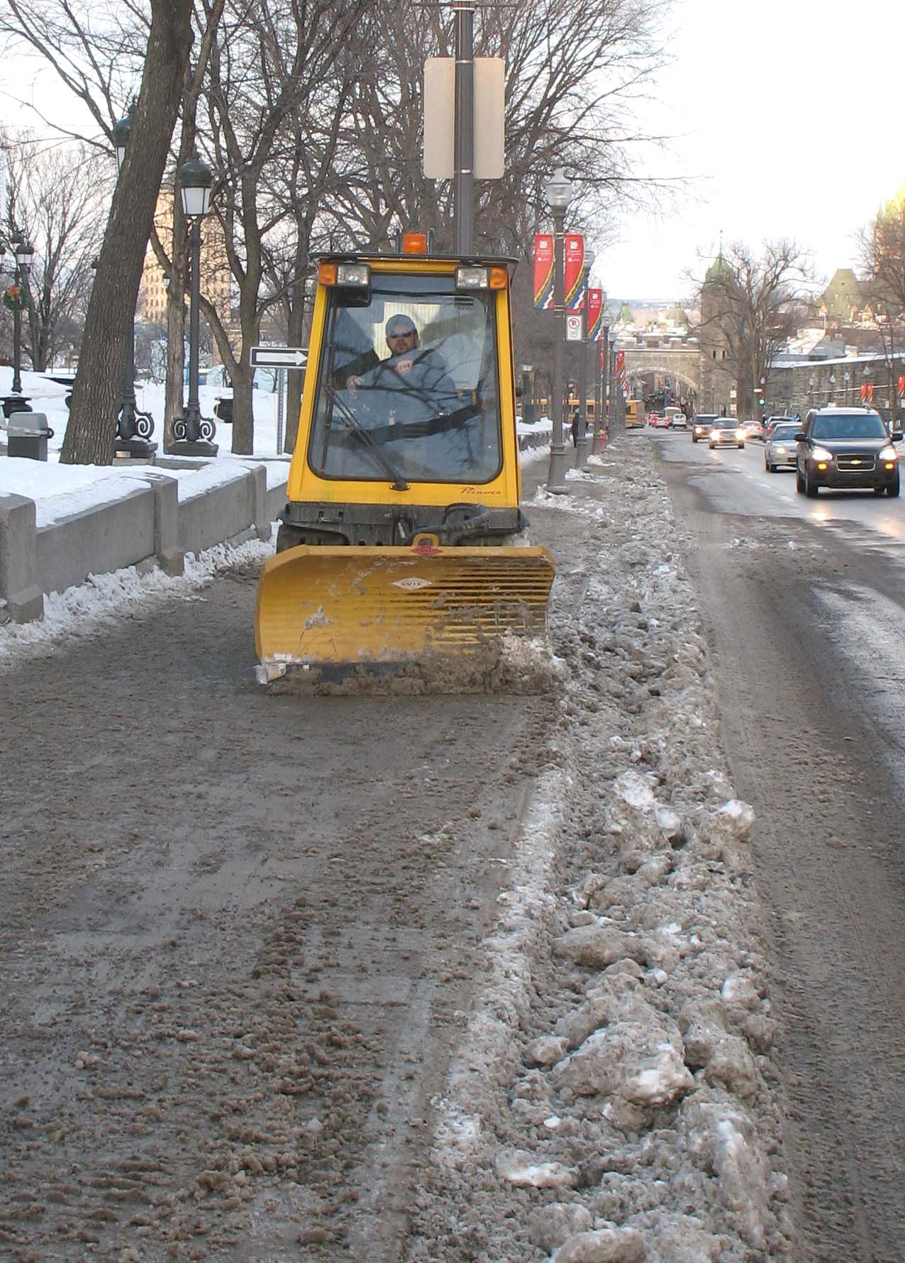 Petit chasse-neige de trottoir, ou gratte de trottoir sur la Grande Allée à Québec (Québec) Canada